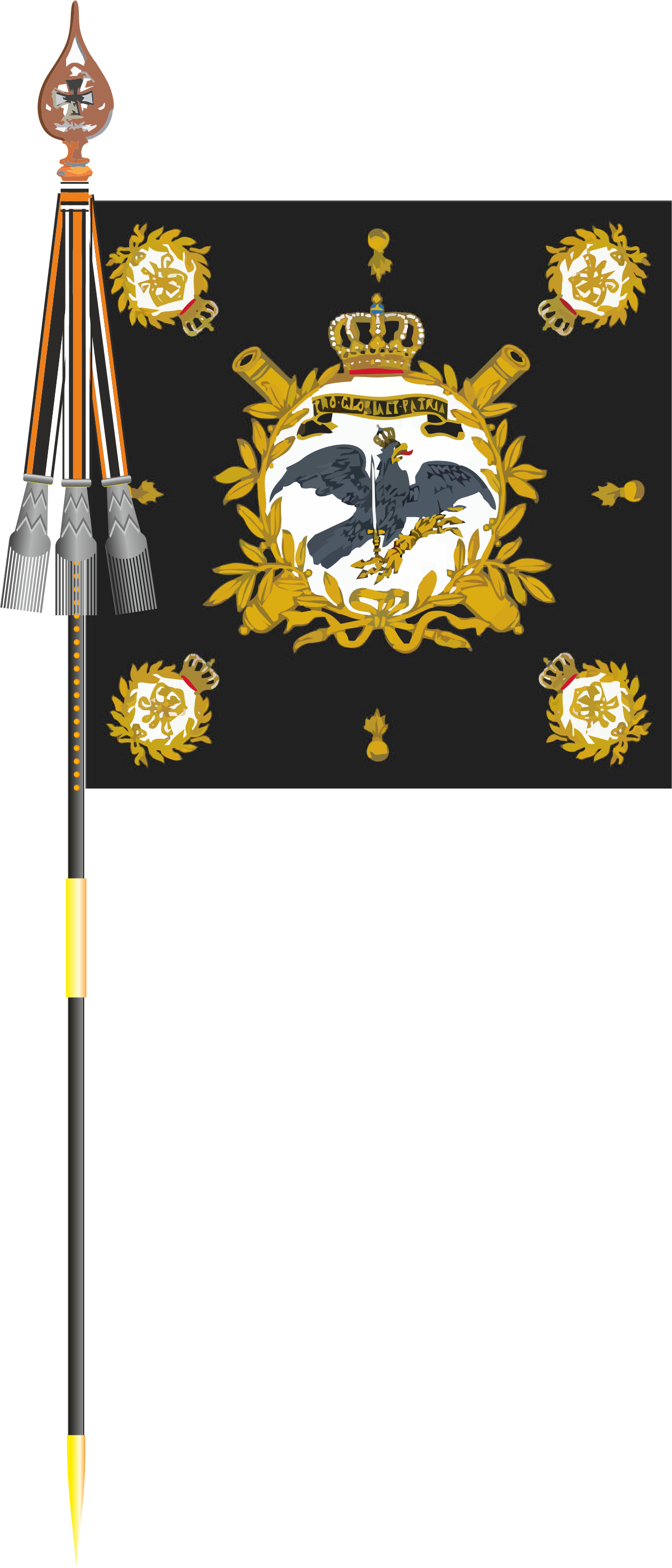 Fahne des Rheinischen Fußartillerieregiments Nr. 8 mit Fahnenbändern nach 1871